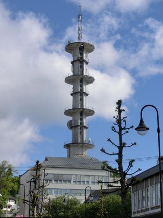 Bilde av teletårnet i Leirvik sett fra Torgbakken